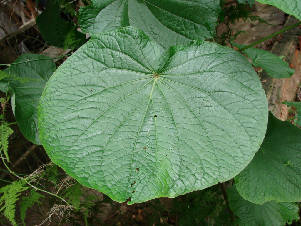 Piper umbellatum - PIPERACEAE - Área de Relevante Interesse Ecológico do Riacho Fundo - Brasília - Distrito Federal - Brasil.